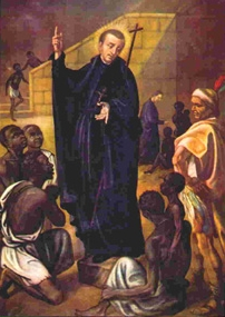 Saint Peter Claver